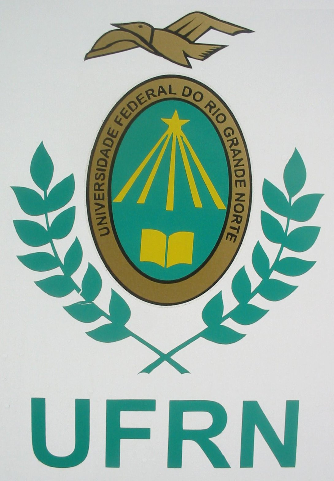 Natal (Rio Grande do Norte), Brasil. Brasão da Universidade Federal (UFRN). Natal, Brazil. Seal of UFRN.